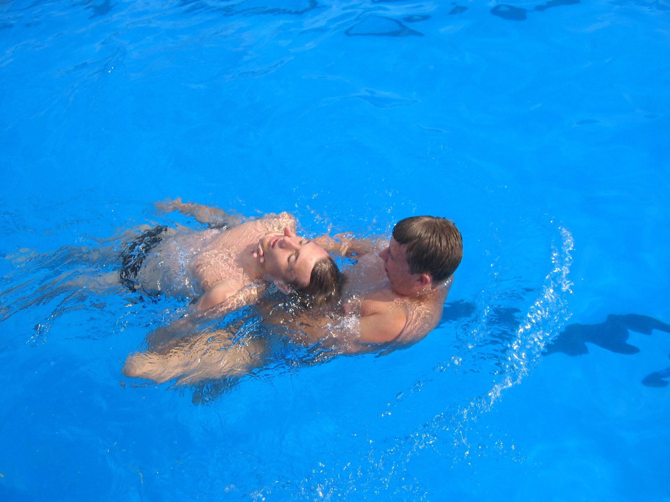 Anwendung des Standardfesselschleppgriffes